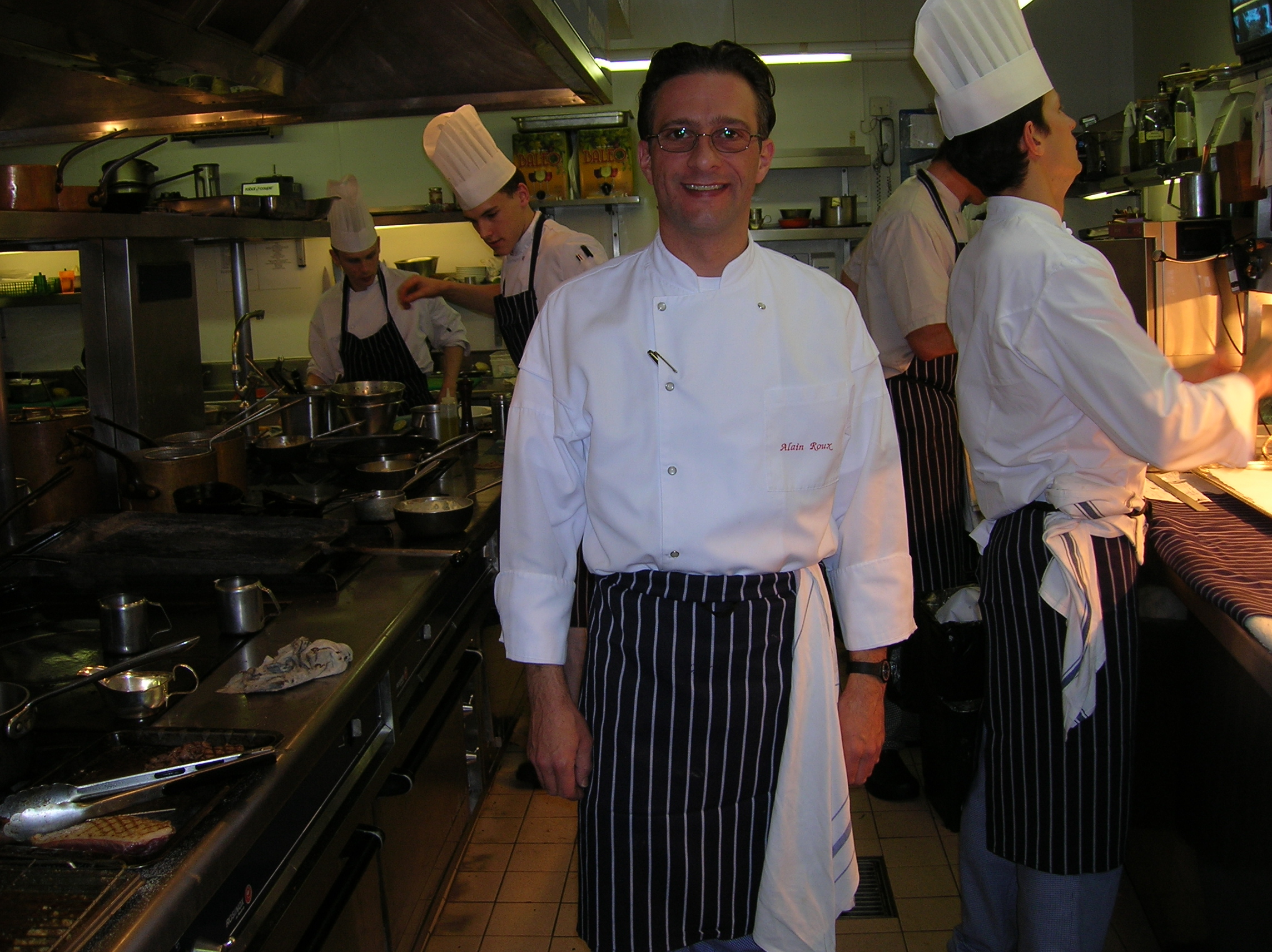 אלן רו, שף ממסעדת ווטרסייד אין בבריי, ברקשייר, אנגליה